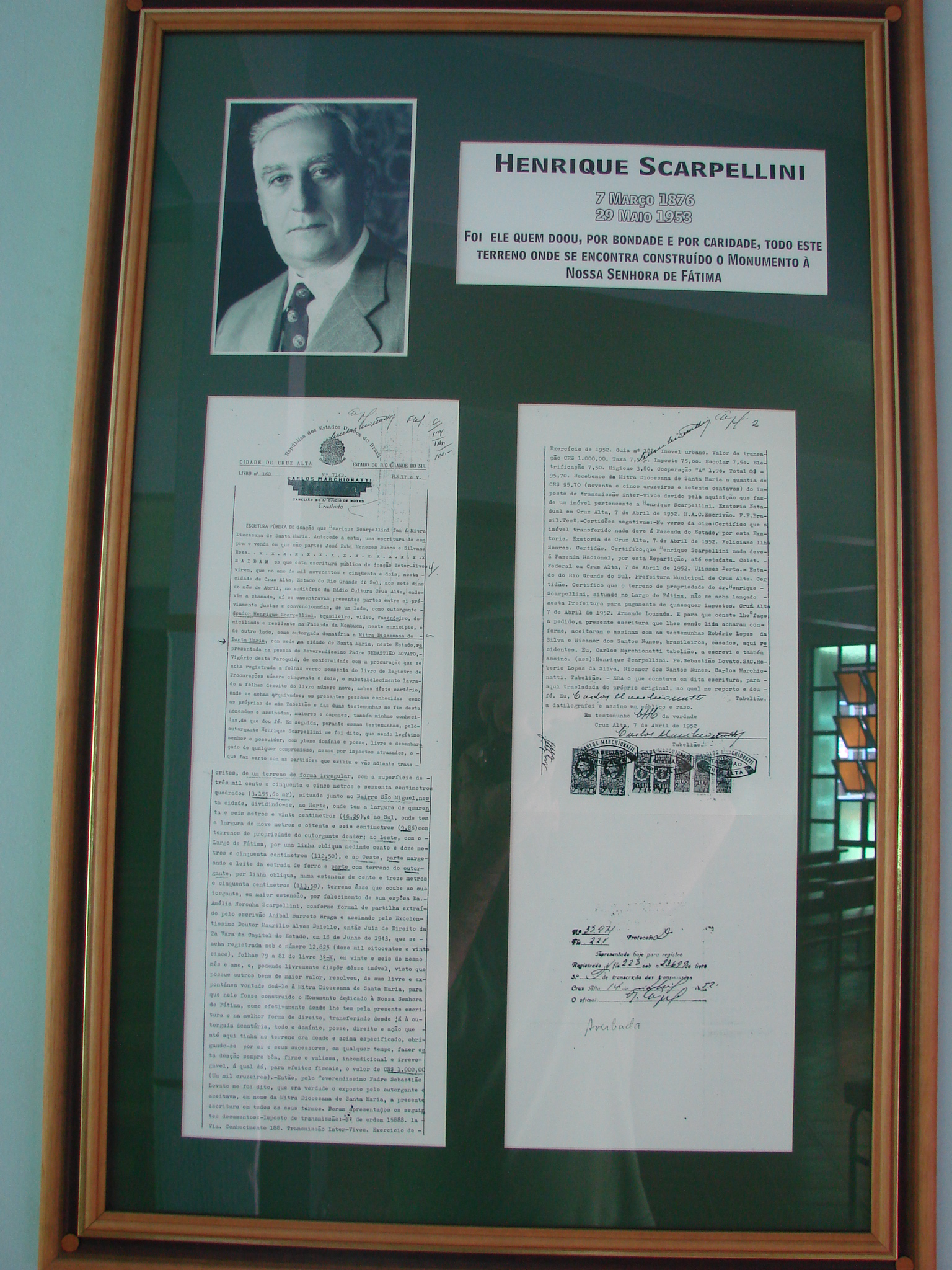 Henrique Scarpellini, doador do terreno onde foi construído o monumento.